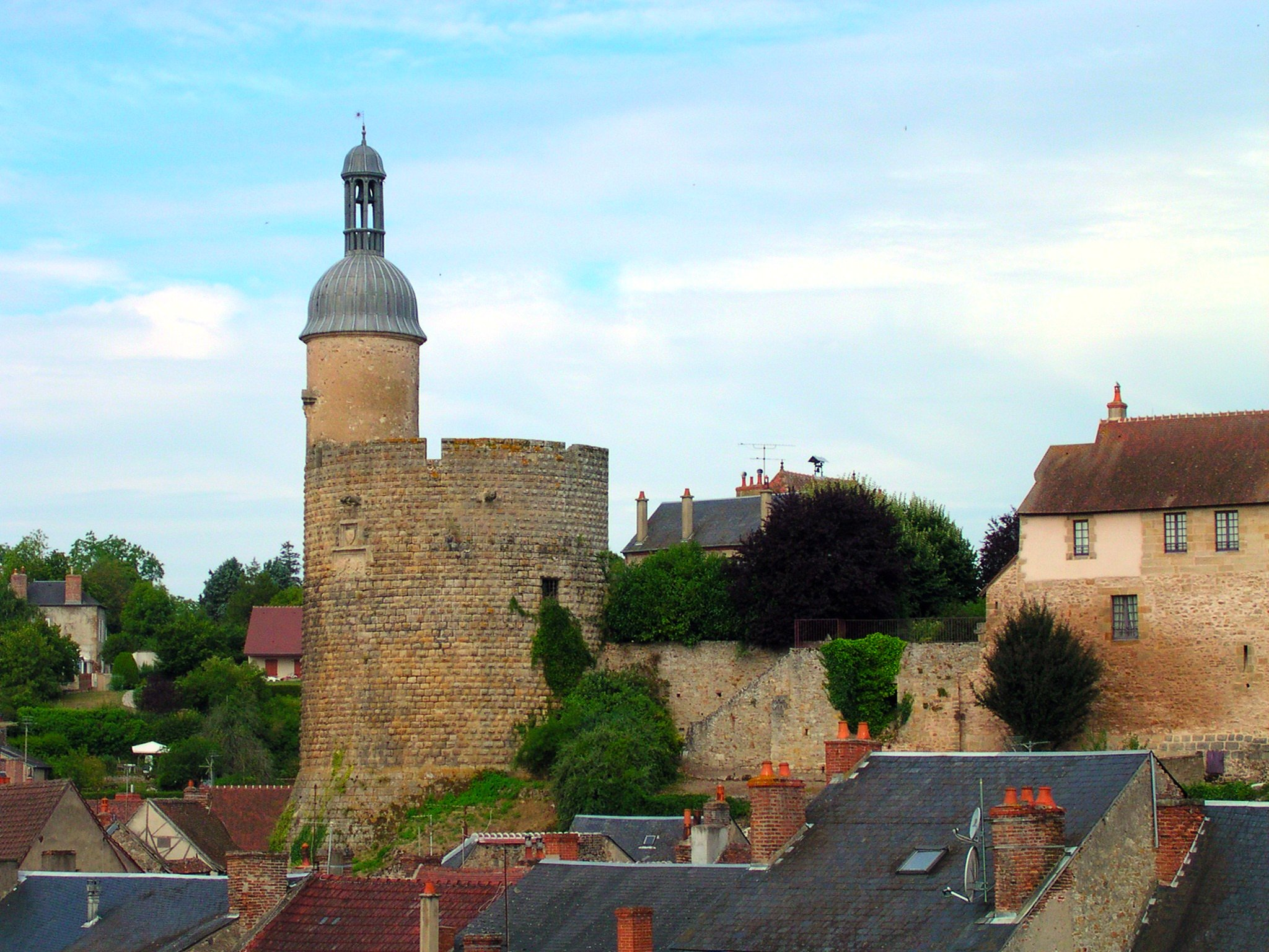 Der Turm Qui Qu'en Grogne der Burg von Bourbon-l'Archambault